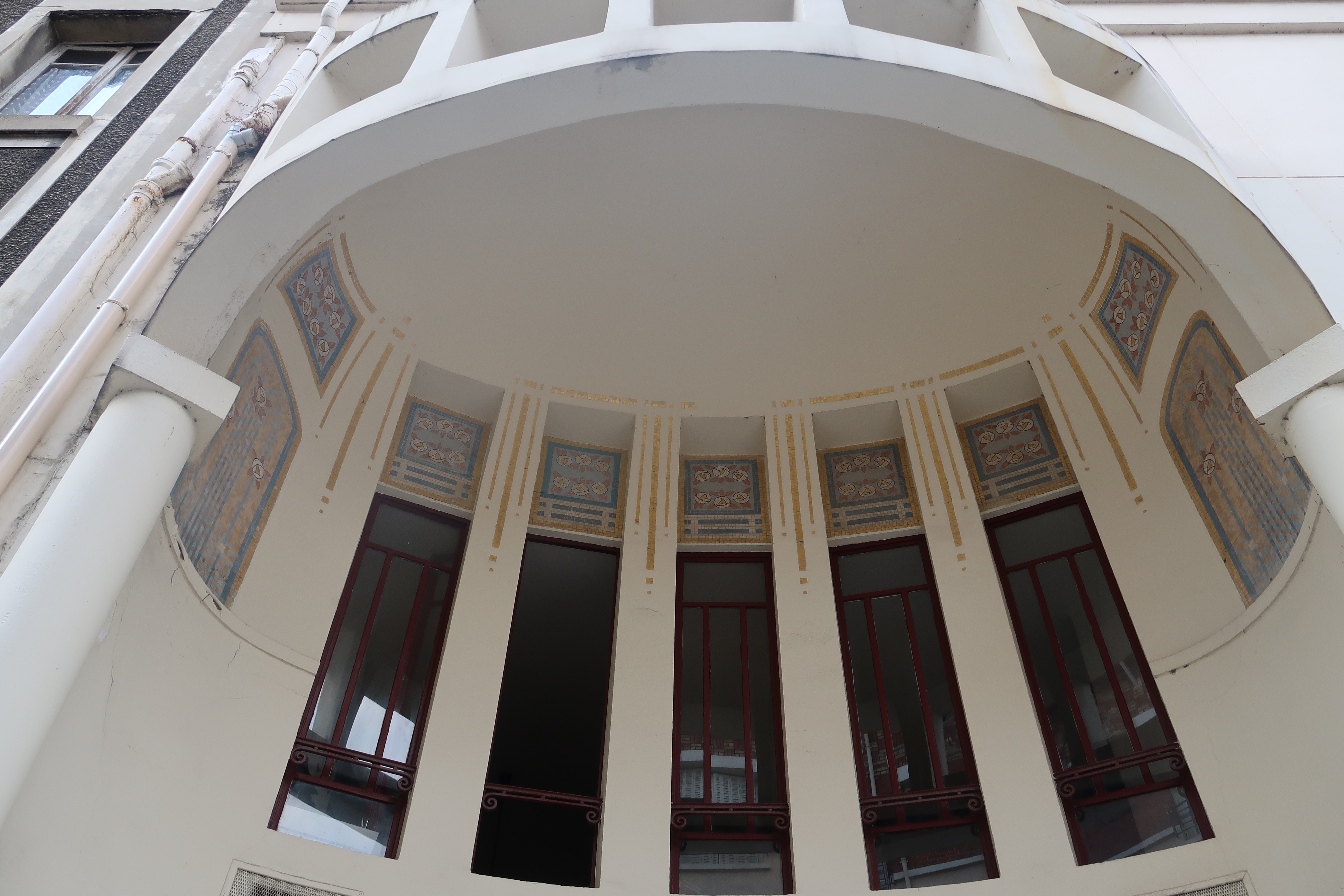 Détail mosaïques ancien cinéma Le Capitole et studio Guillaume Tell, 20 avenue de la Belle-Gabrielle à Suresnes (Hauts-de-Seine).